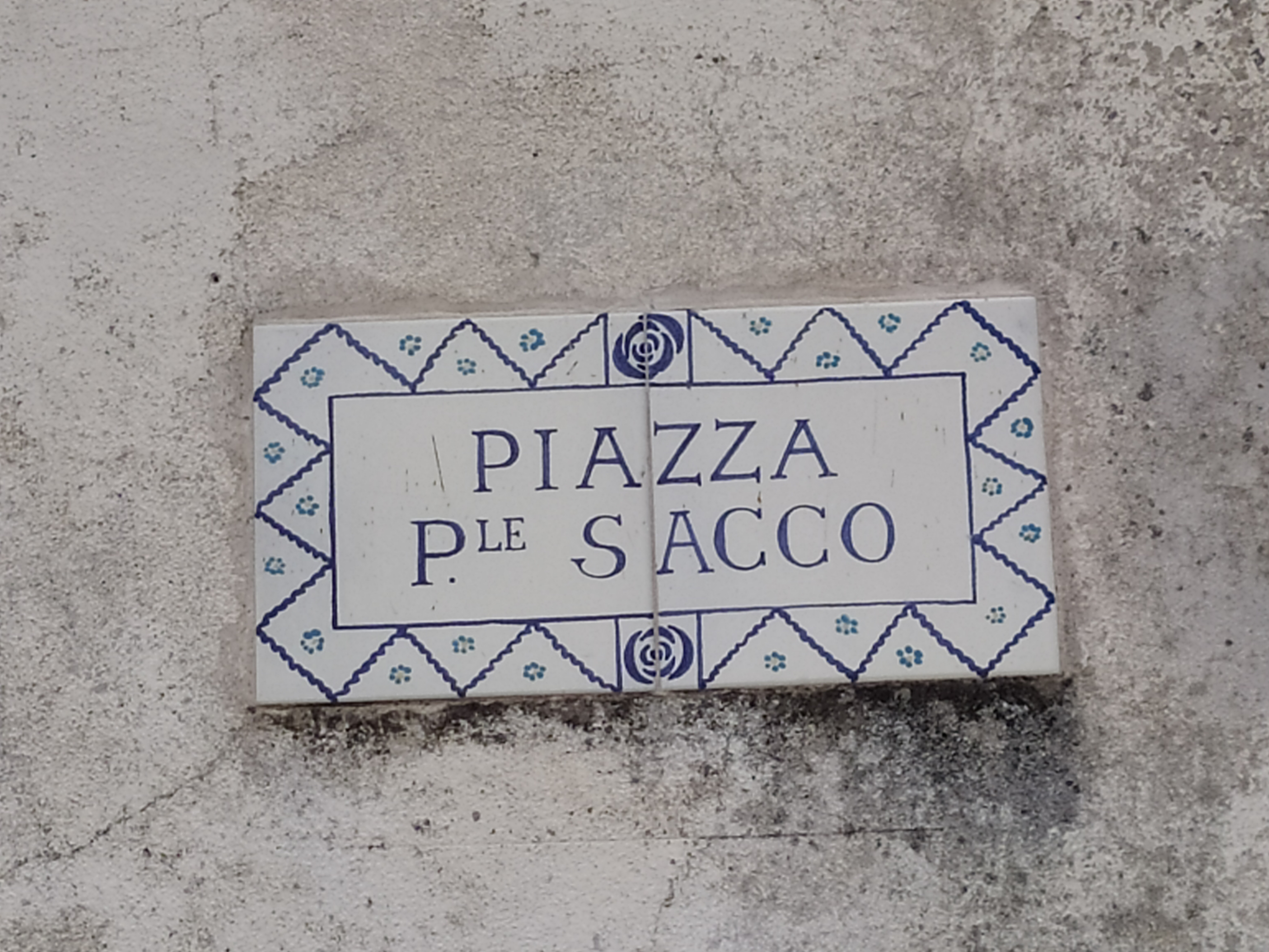 Piazza di Torello, frazione di Ravello (SA), intitolata all'eroe ravellese Pasquale Sacco, carabiniere che diede la vita per salvare quella di alcuni bambini sangiuseppesi.